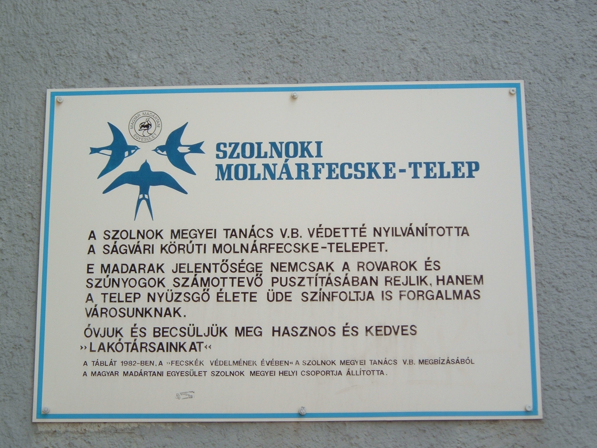 szolnoki molnárfecske-telep a ságvári körúton